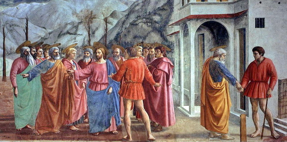 Izokefalizm